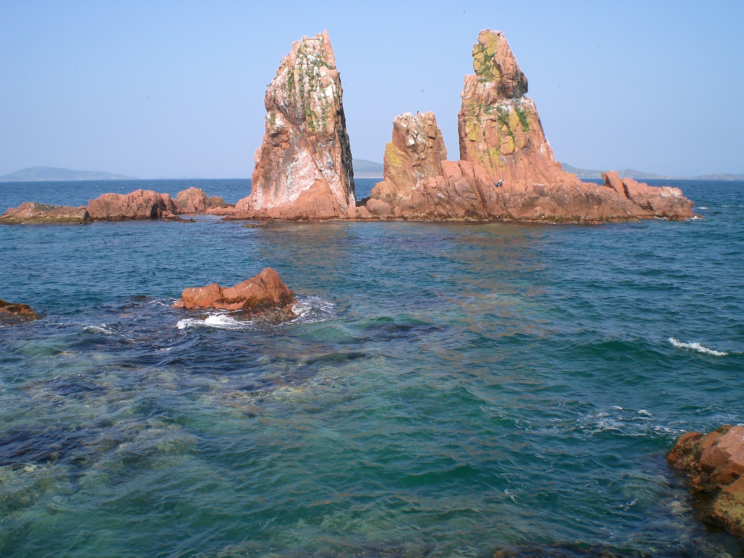 Залив Петра Великого в районе островов Верховского